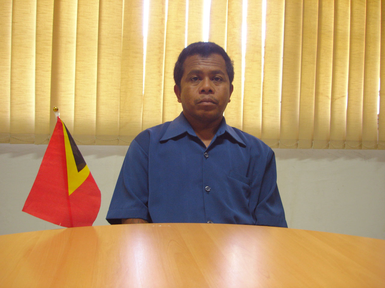 Custodio Martins, Administrator des Subdistrikts Hatulia